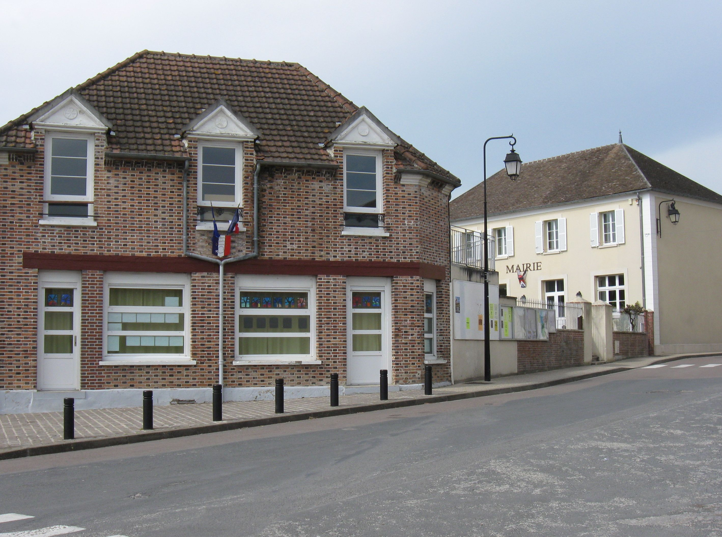 Mairie-école de Bazoches-lès-Bray. (Seine-et-Marne, région Île-de-France).